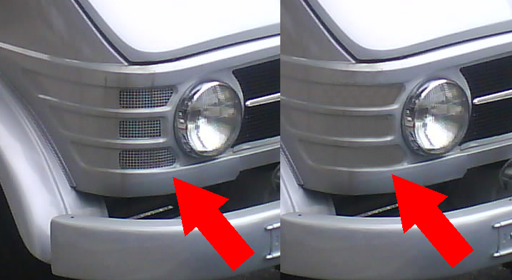 Lüftungsgitter eines Unimog 406 Basierend auf: Almost new looking UNIMOG in Baltimore, Maryland, US.jpg von Kyle Van Horn, CC-BY-SA 2.0